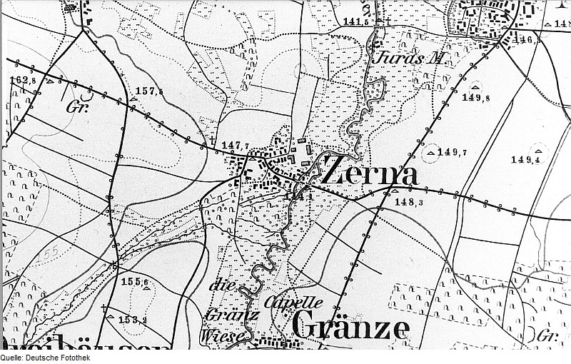 Original image description from the Deutsche Fotothek Ralbitz-Rosenthal-Zerna. Meßtischblatt, Sekt. Kloster Marienstern, 1884